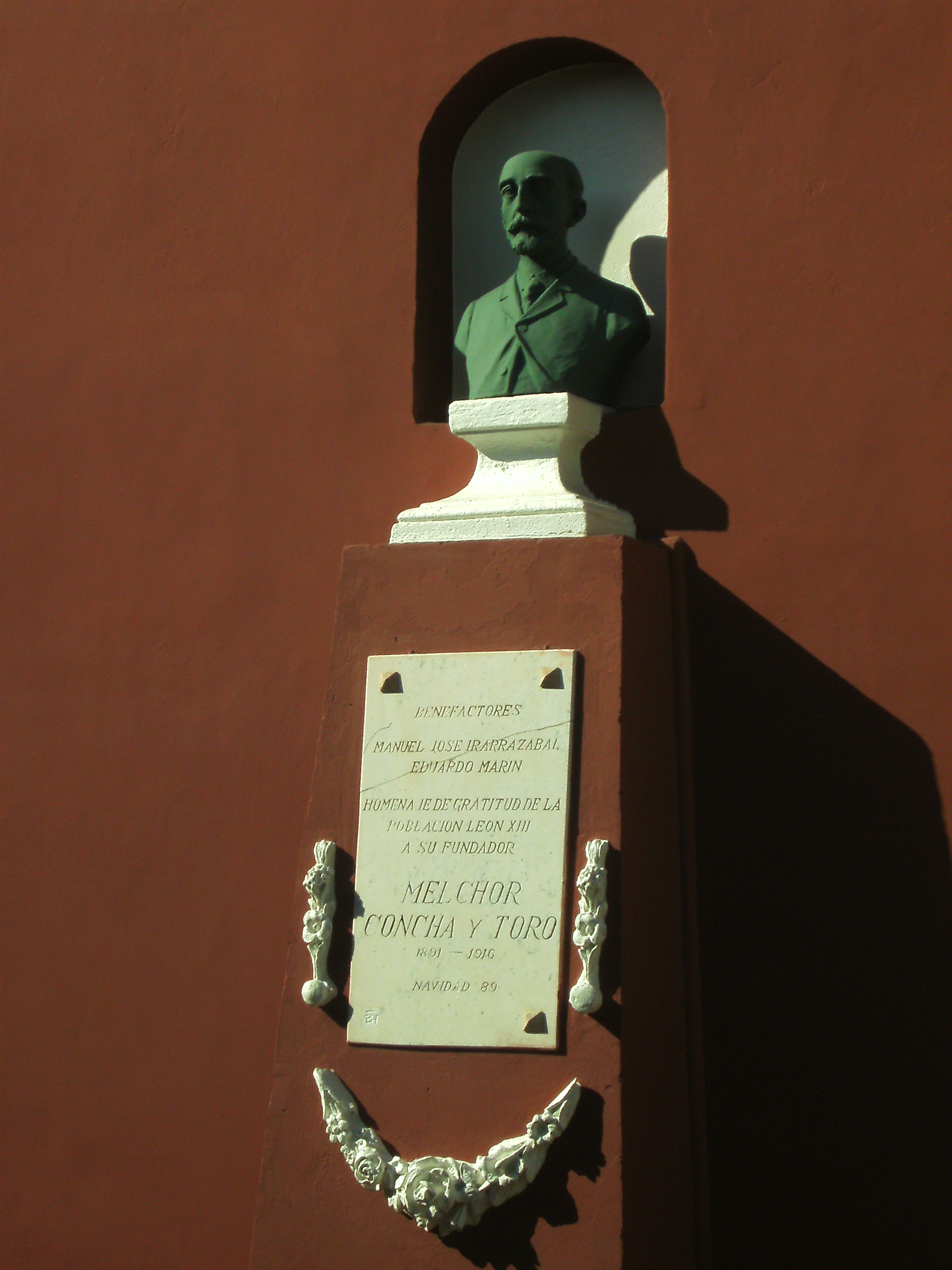 Iglesia Epifanía del Señor, ubicada en la población Leòn XIII en el barrio Bellavista de Santiago de Chile This is a photo of a national monument in Chile: 900